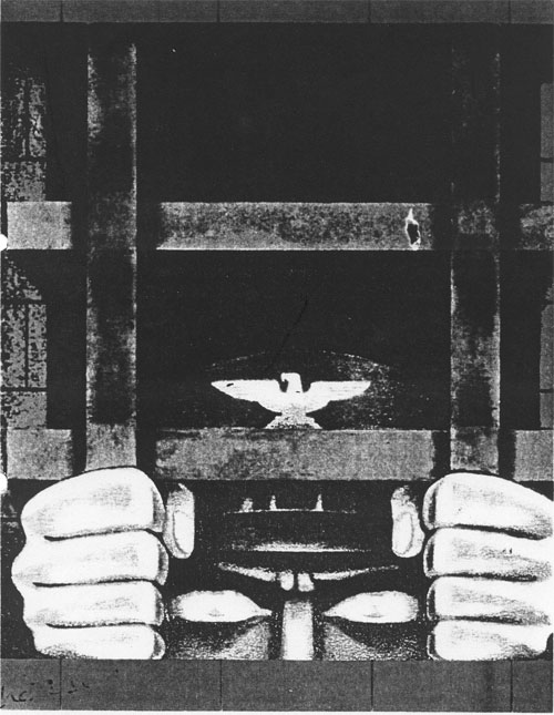 Le Traité de Versailles vu par les Allemands Auteur: ? Date: Environ 1920 Note: Sur l'image originale, les yeux et l'aigle sont lumineux (jaune), tandis que le mur et les barreaux ont une teinte rouge. Le fond quant à lui reste noir